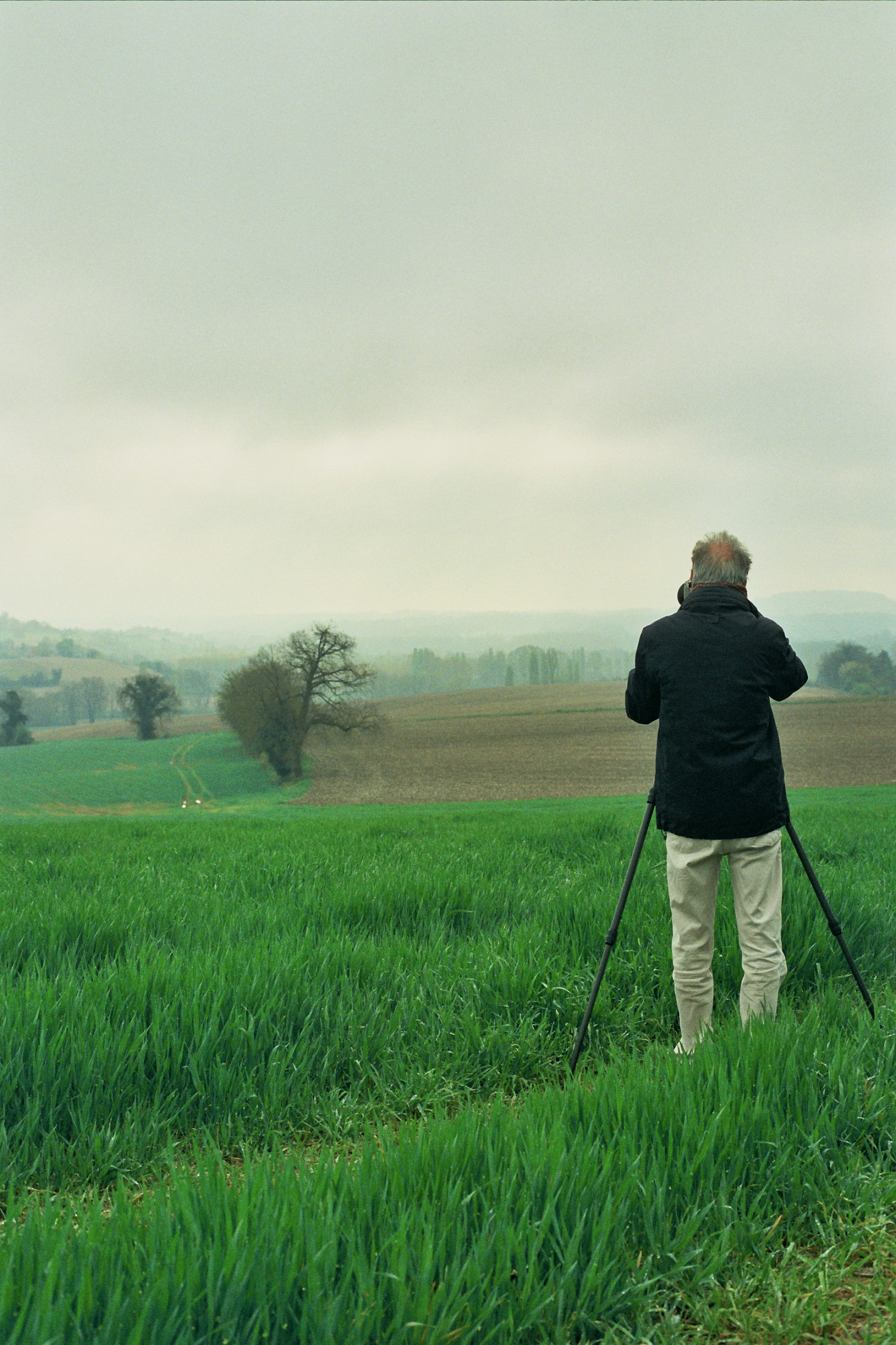 Marc Deneyer photographiant le paysage charentais à quelques mètres du domaine de Toutvent.